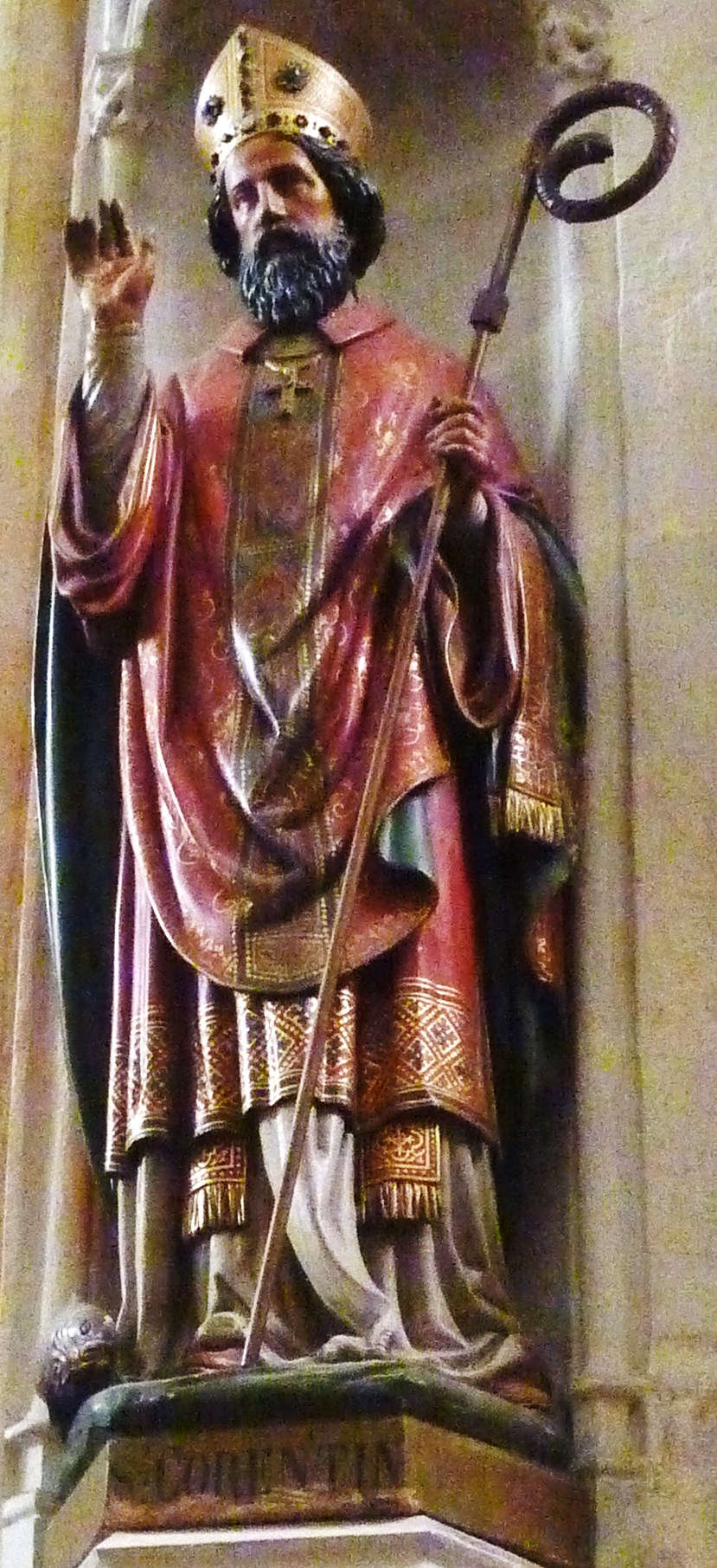 Autre statue de saint Corentin dans la cathédrale Saint-Corentin de Quimper